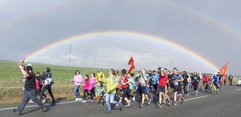 Hala Bedi.eus - "Korrika takoiekin" artikuluarekin zetorren argazkia.